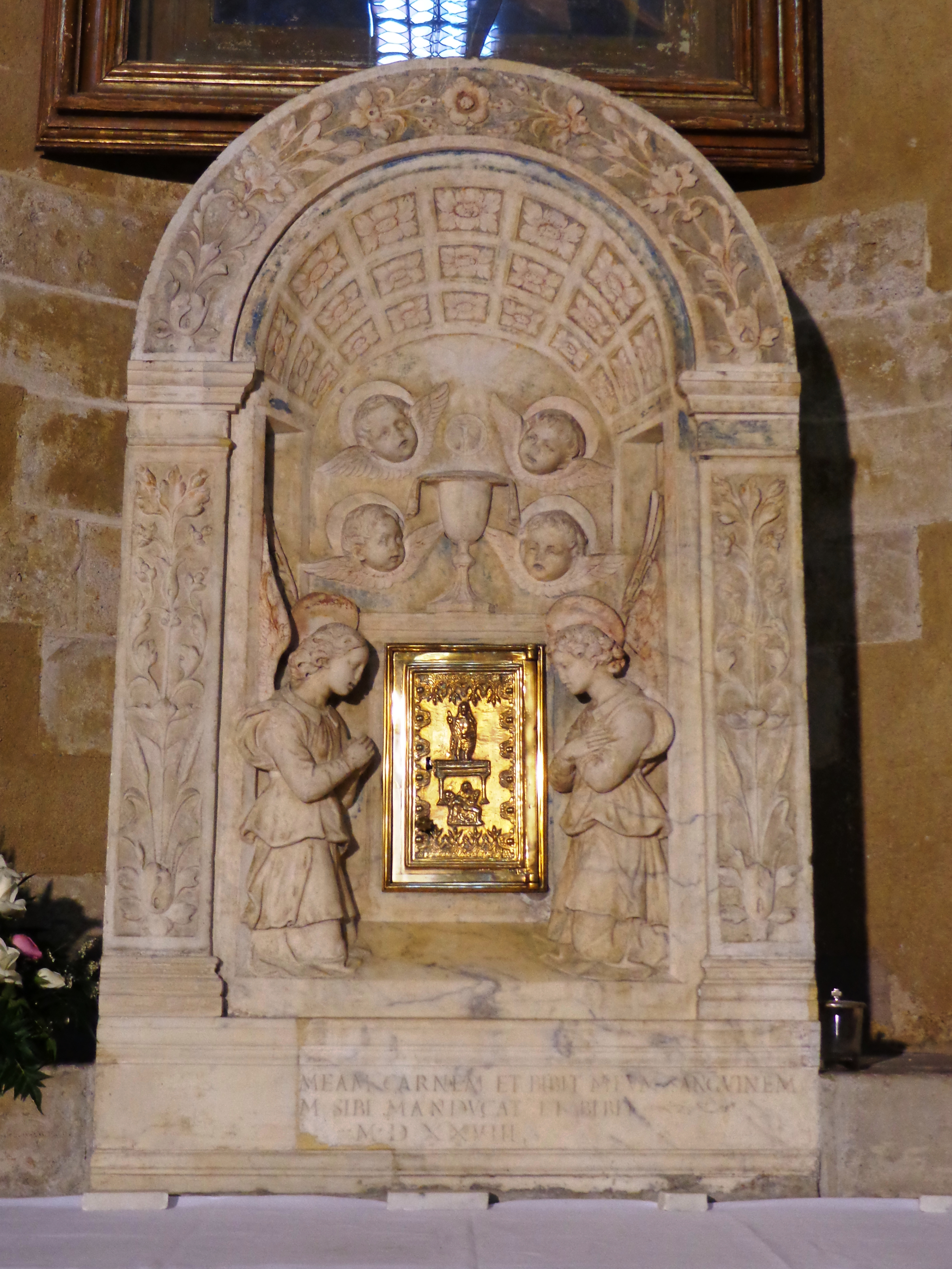 Chiesa_Cancelliere_06